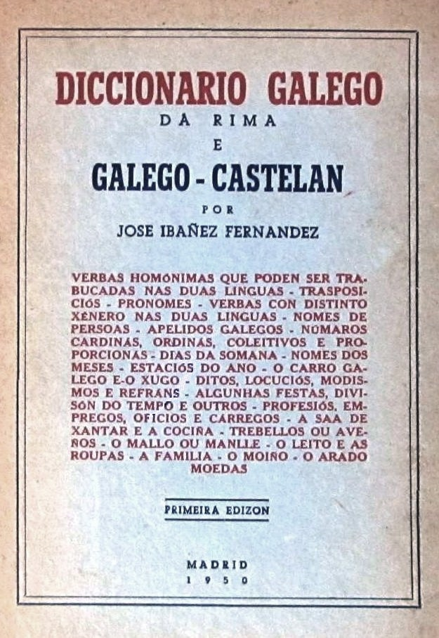 Diccionario galego da rima e galego-castelán